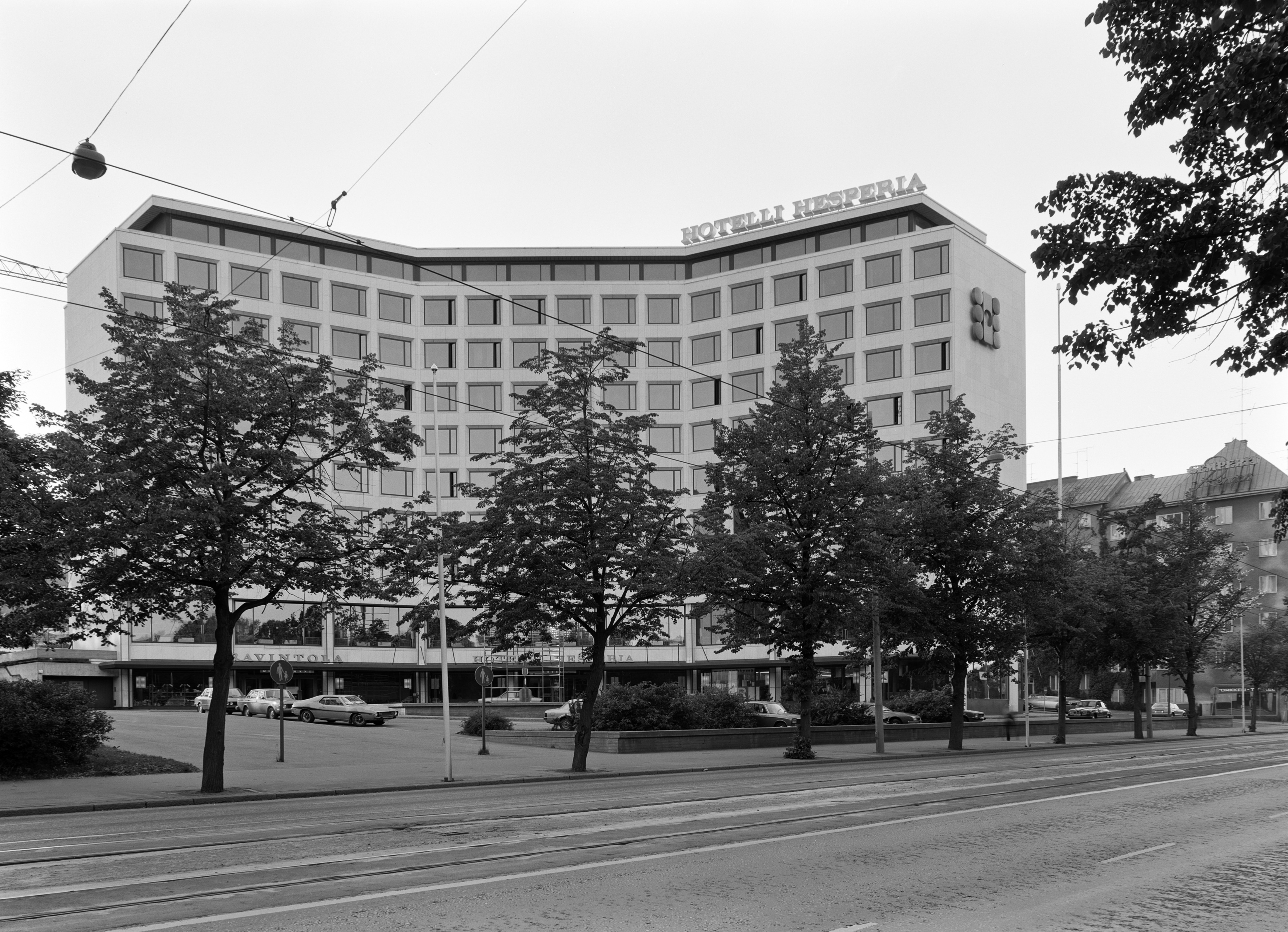 Mannerheimintie 48–50. Hotelli Hesperia Helsingissä vuonna 1978.